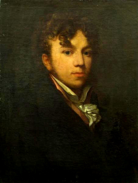 Depicted person: Moritz Retzsch